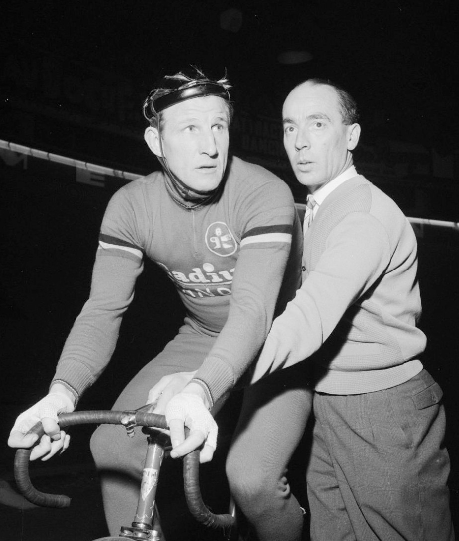 Gerrit Schulte rijdt zijn laatste wedstrijd in Antwerpen